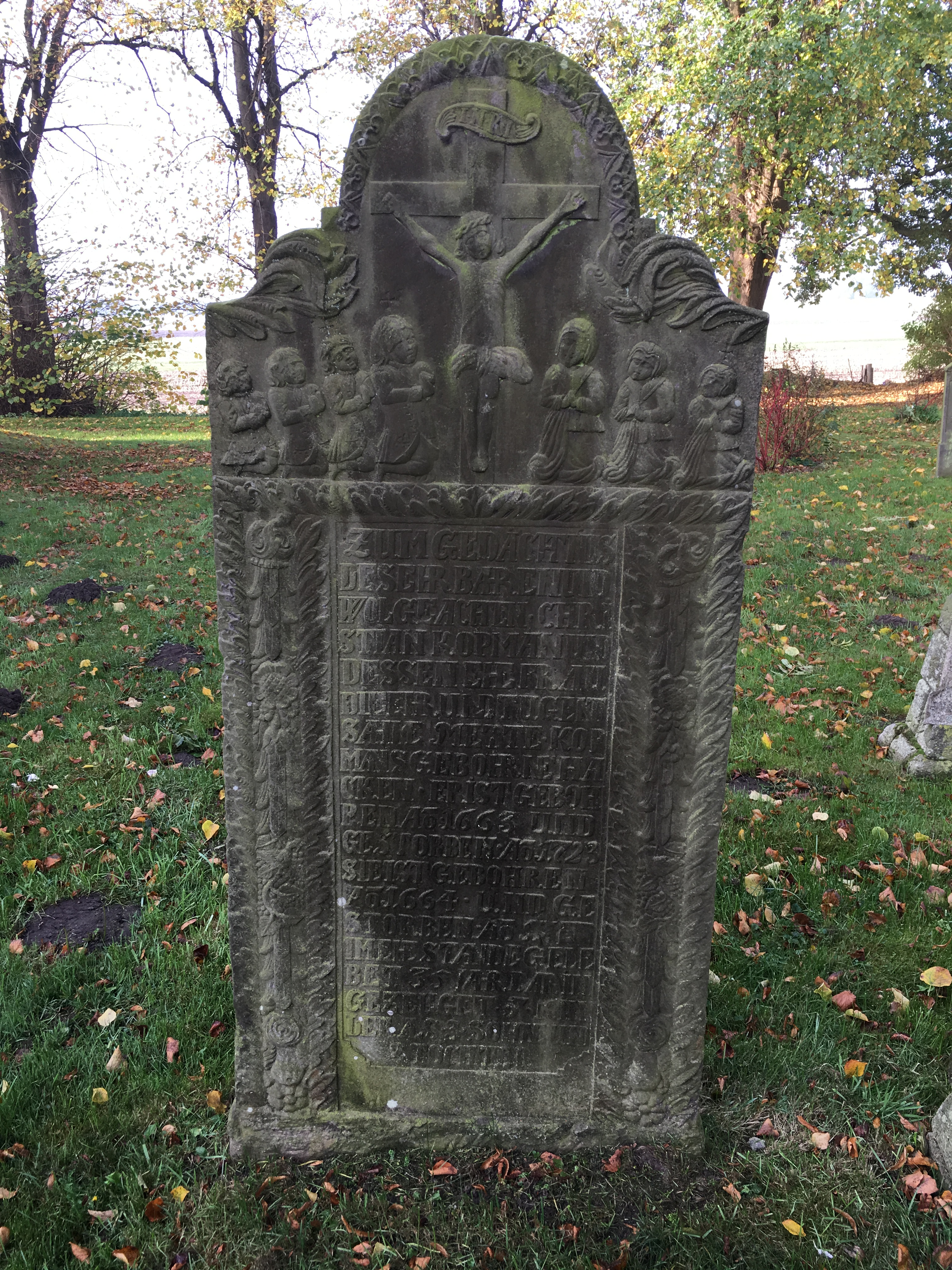 Graffsteen bi de Kark op de Host bi Burweg